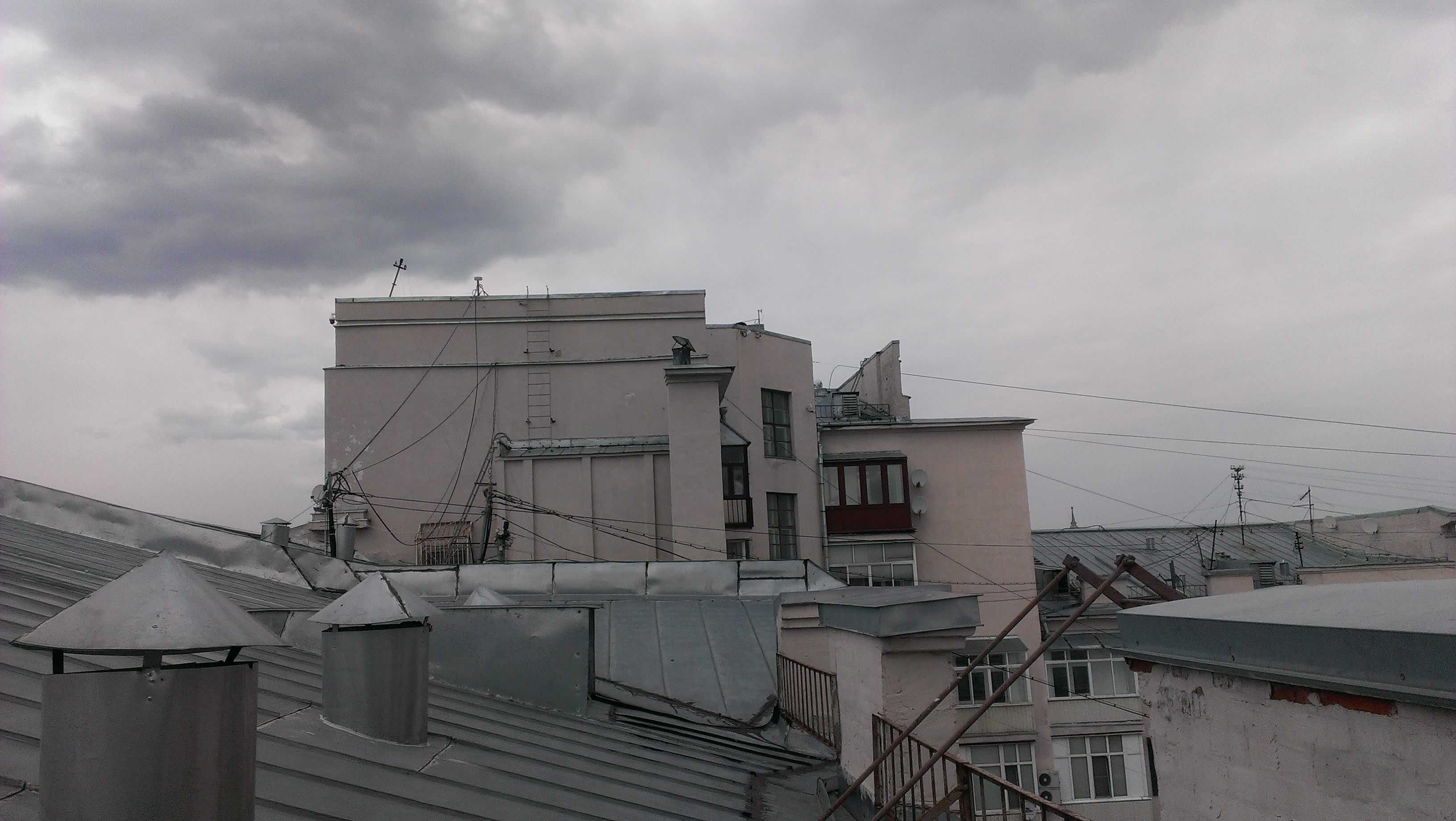 Навершие Жилого дома у покровских ворот (вид с крыши)